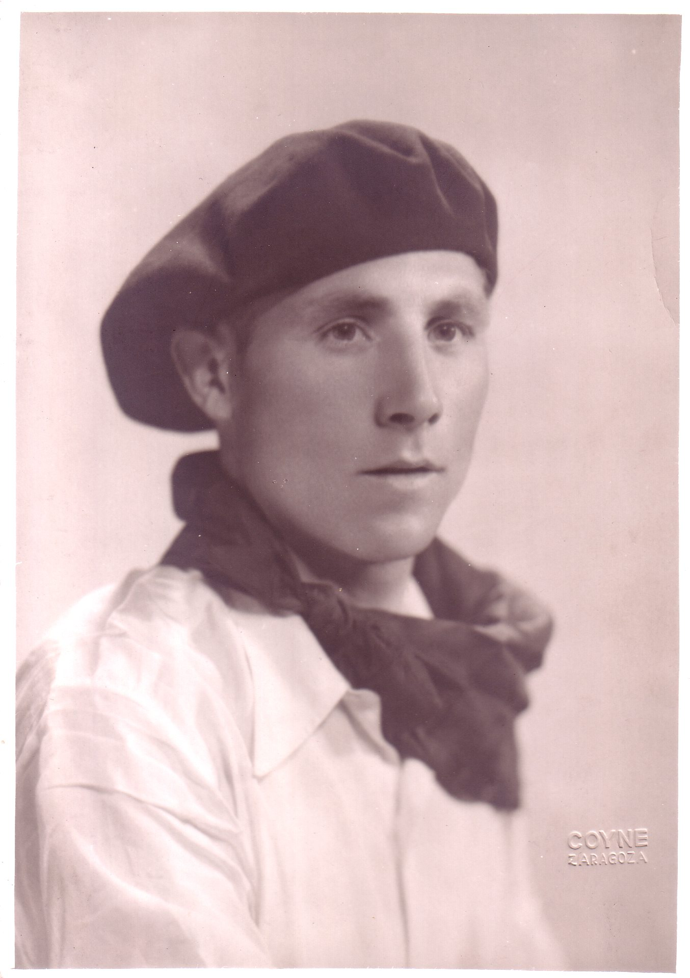 Raimundo Lanas "el ruiseñor navarro"